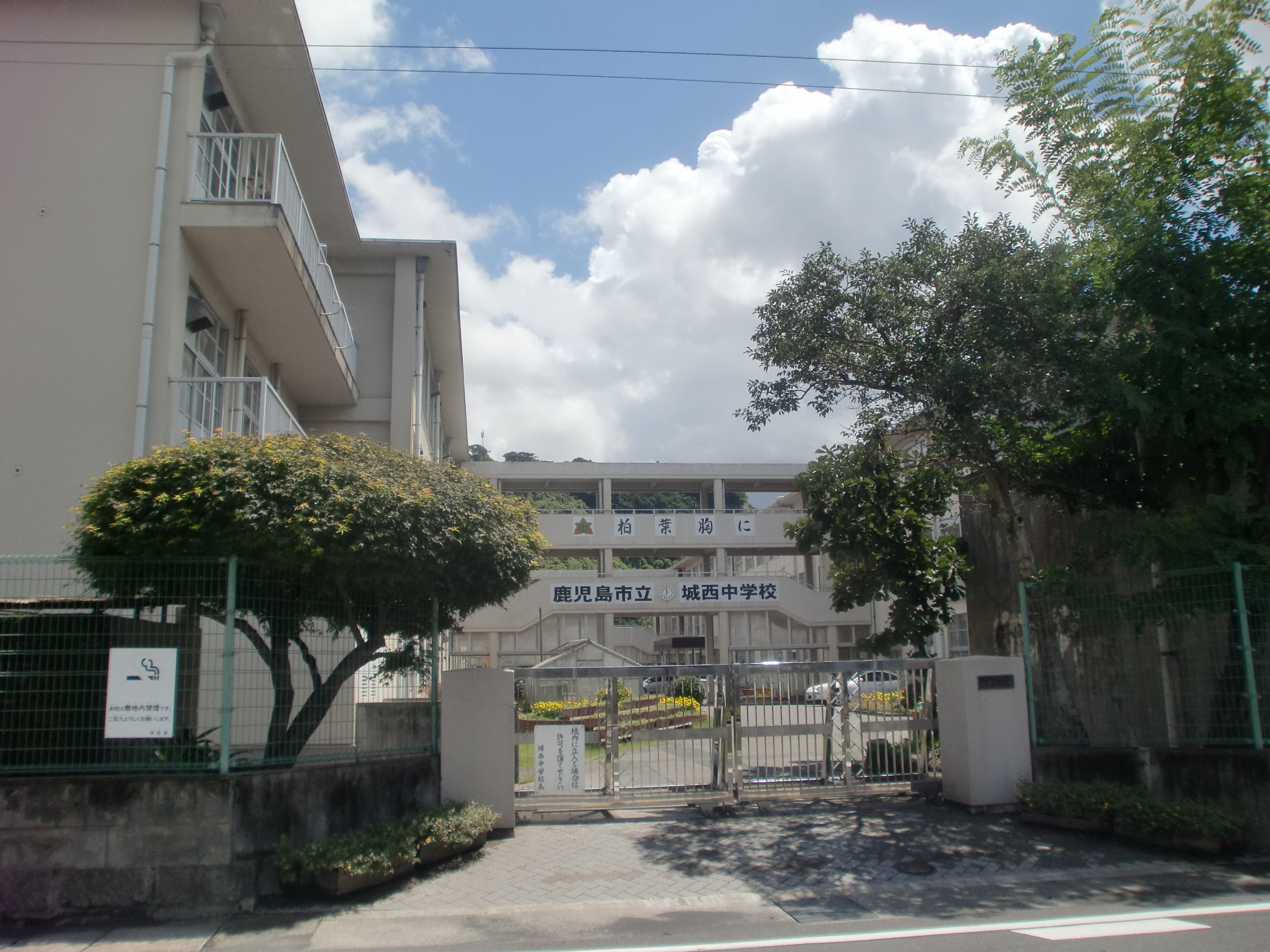 鹿児島市立城西中学校の外観。